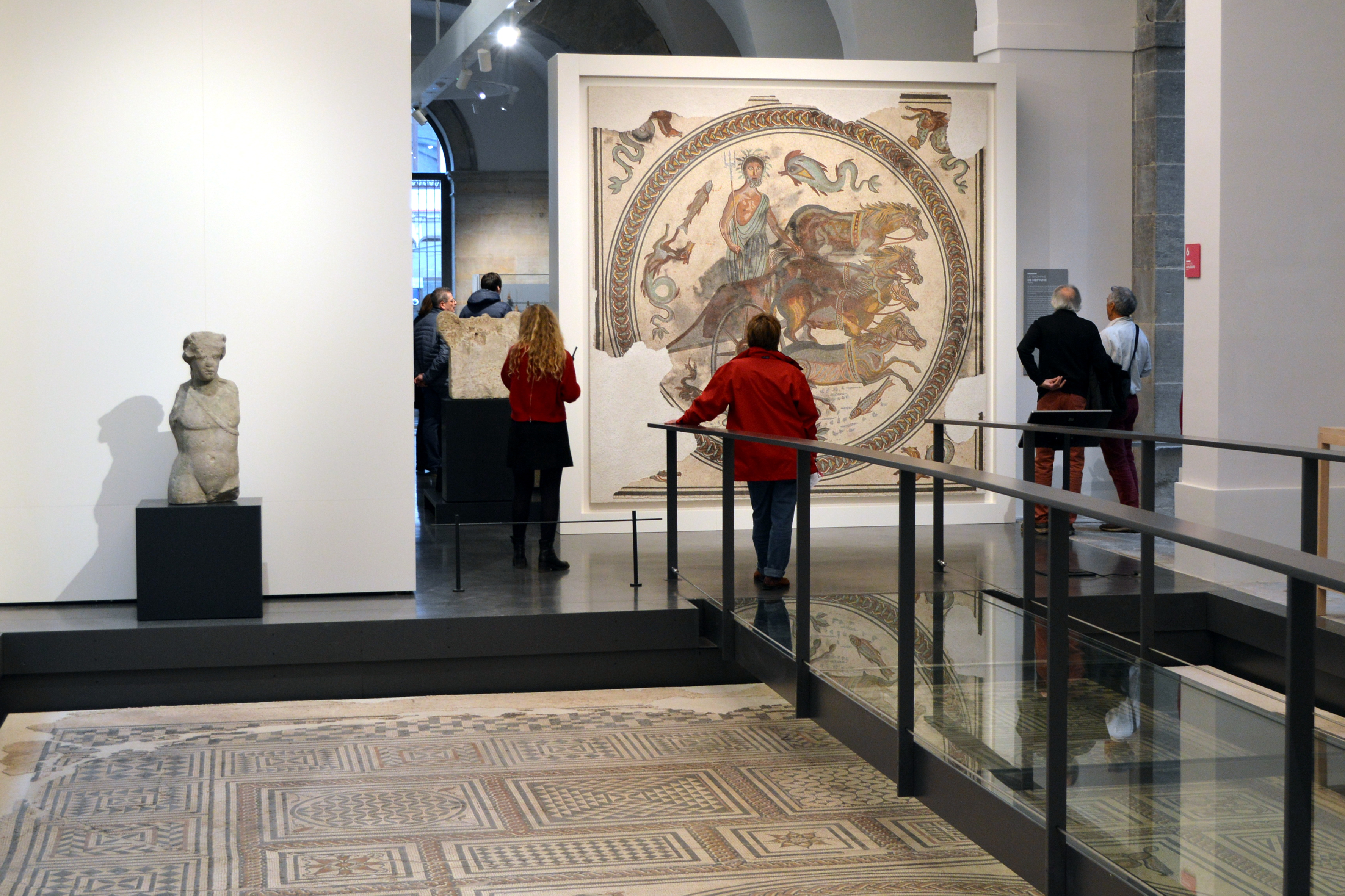 Salle du musée des Beaux-Arts et d'Archéologie de Besançon présentant des vestiges archéologiques de la ville datant de l'Antiquité.